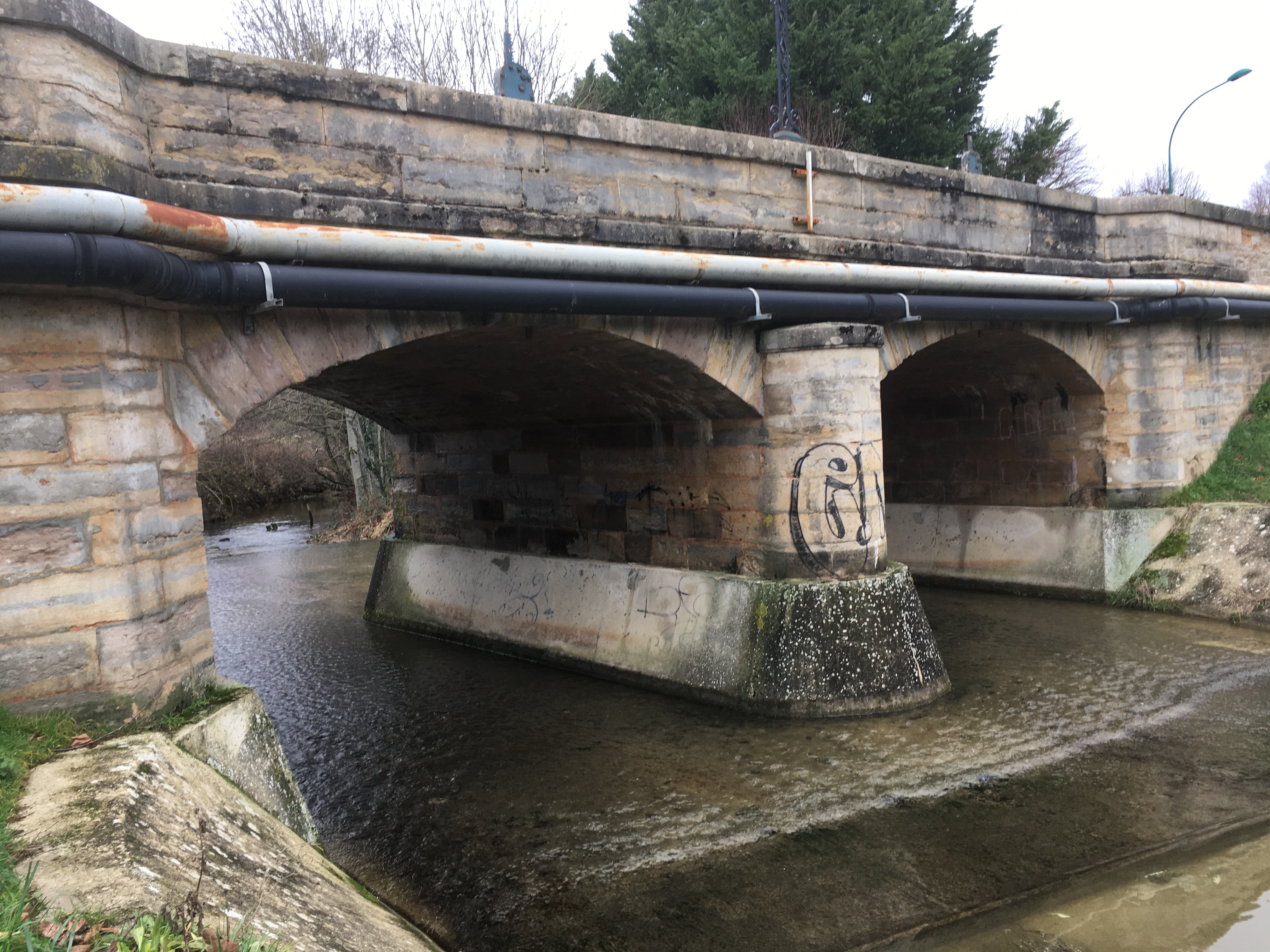 Pont de l'Amance à Radonvilliers en janvier 2020